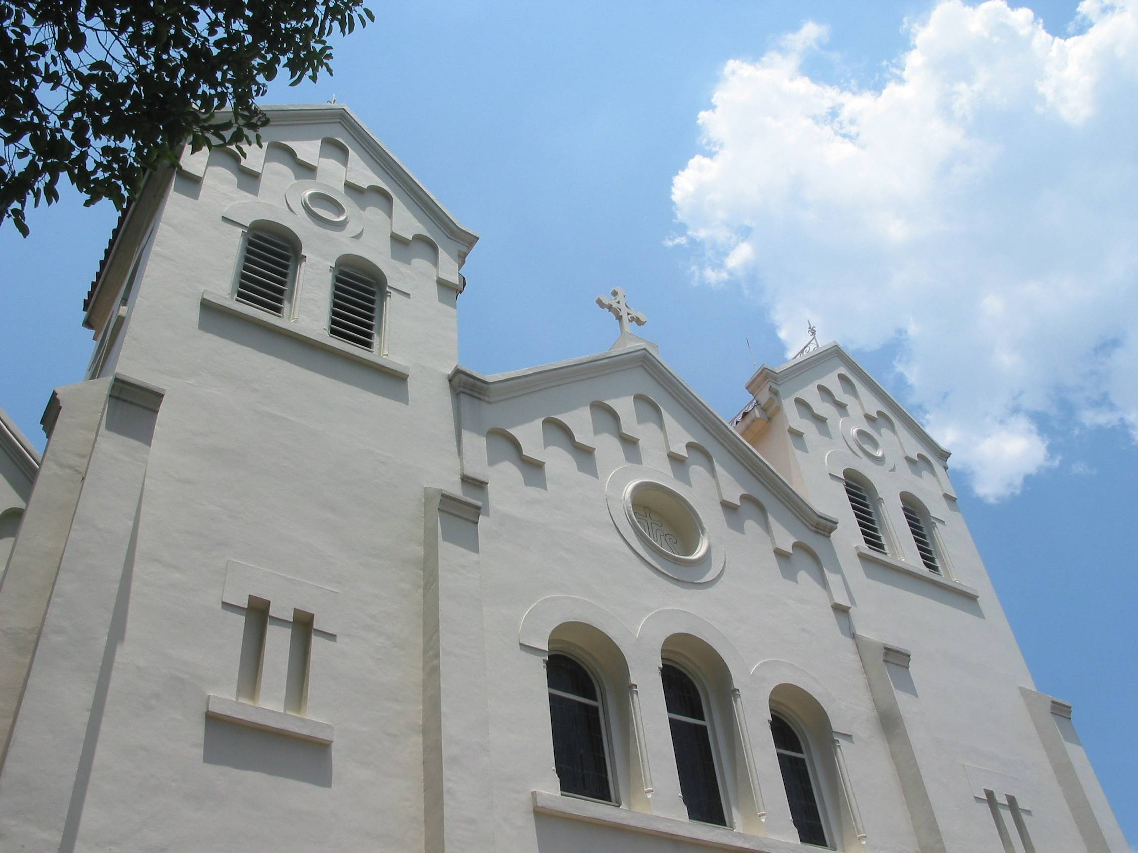 St. Anthony Church Surakarta